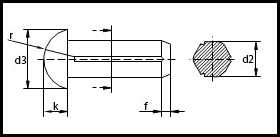 ISO 8746